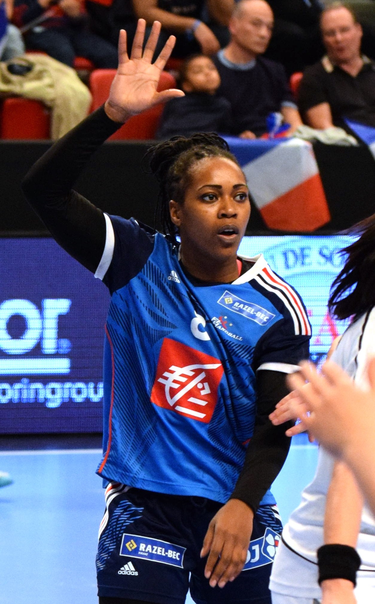 Laurisa Landre ,le 29 novembre 2015, lors du match France / République Tchèque pour le compte du TIPIFF 2015. Au stade Pierre de Coubertin à Paris.